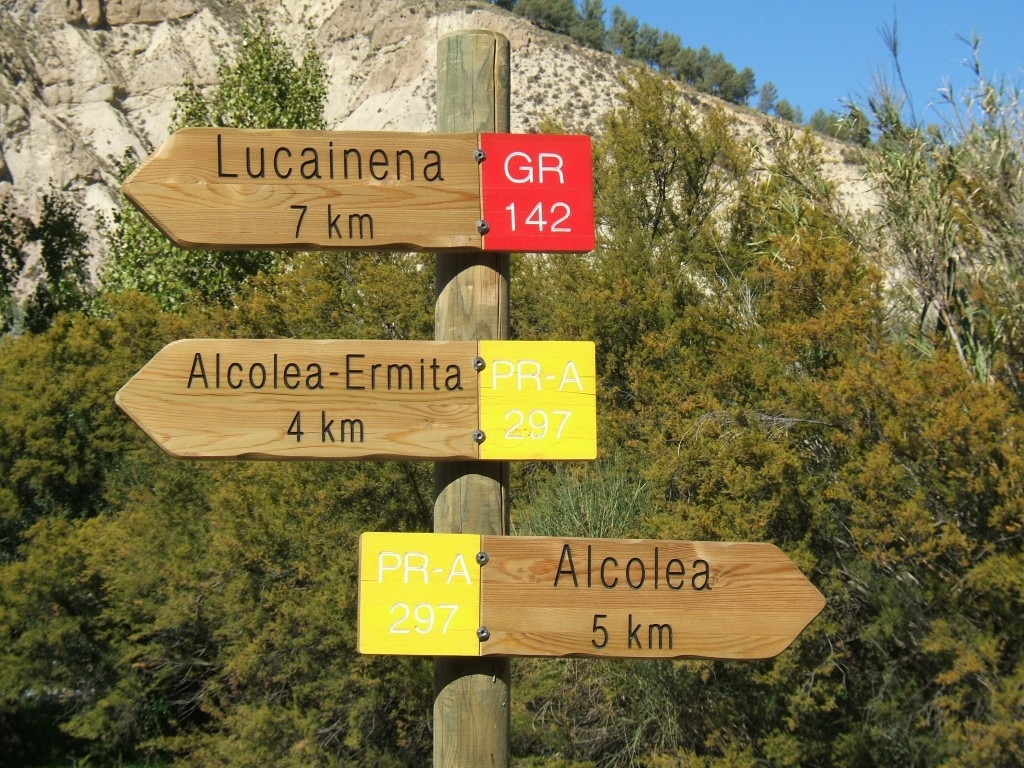 Señalización de senderos.